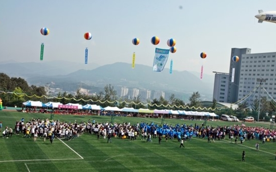 한림대학교 기숙사.